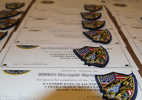 Сертифікати ФБР про закінчення базового курсу із застосуванням спеціальної зброї і тактики.